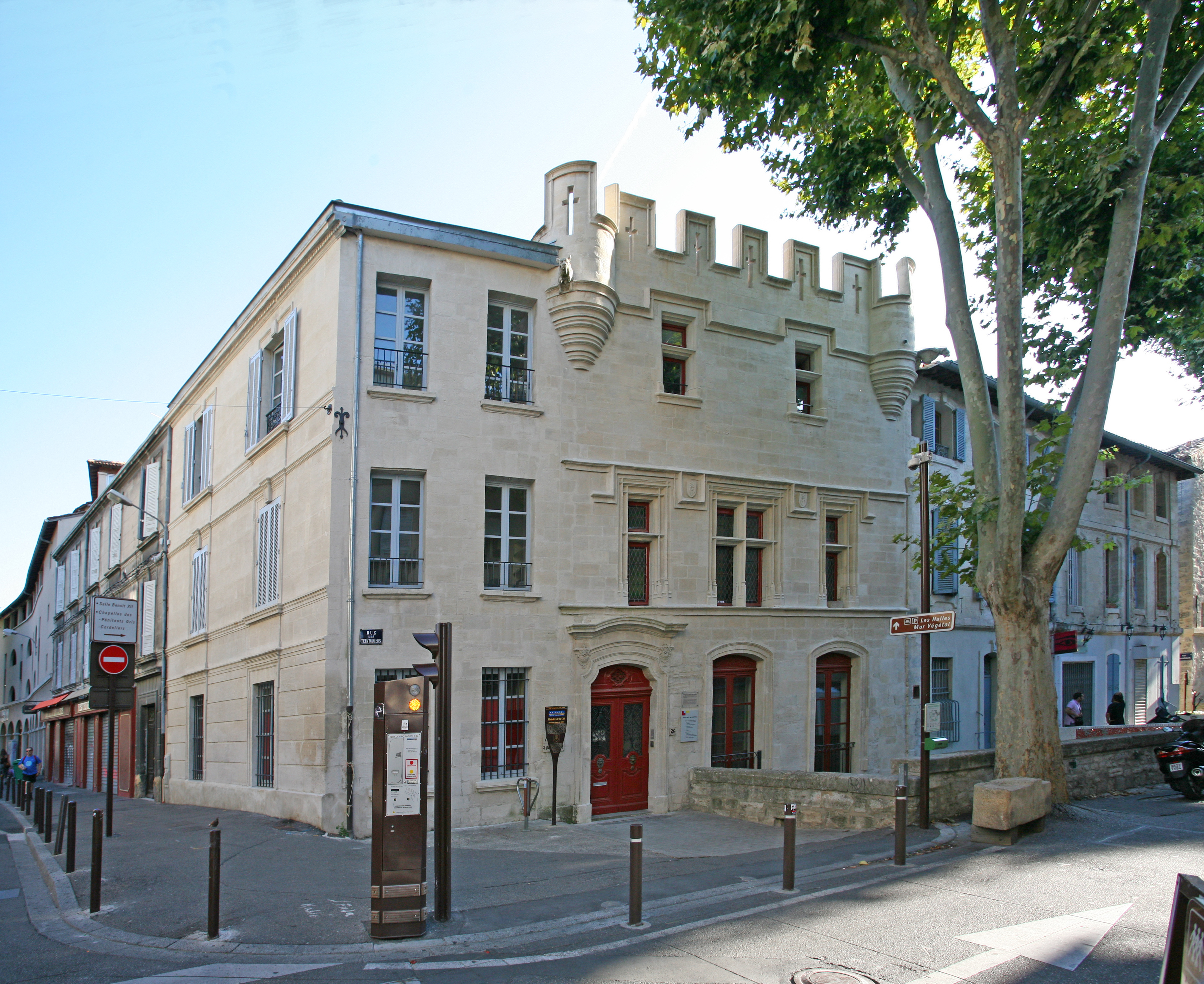 Maison du IV de Chiffre, Avignon, Vaucluse, France.